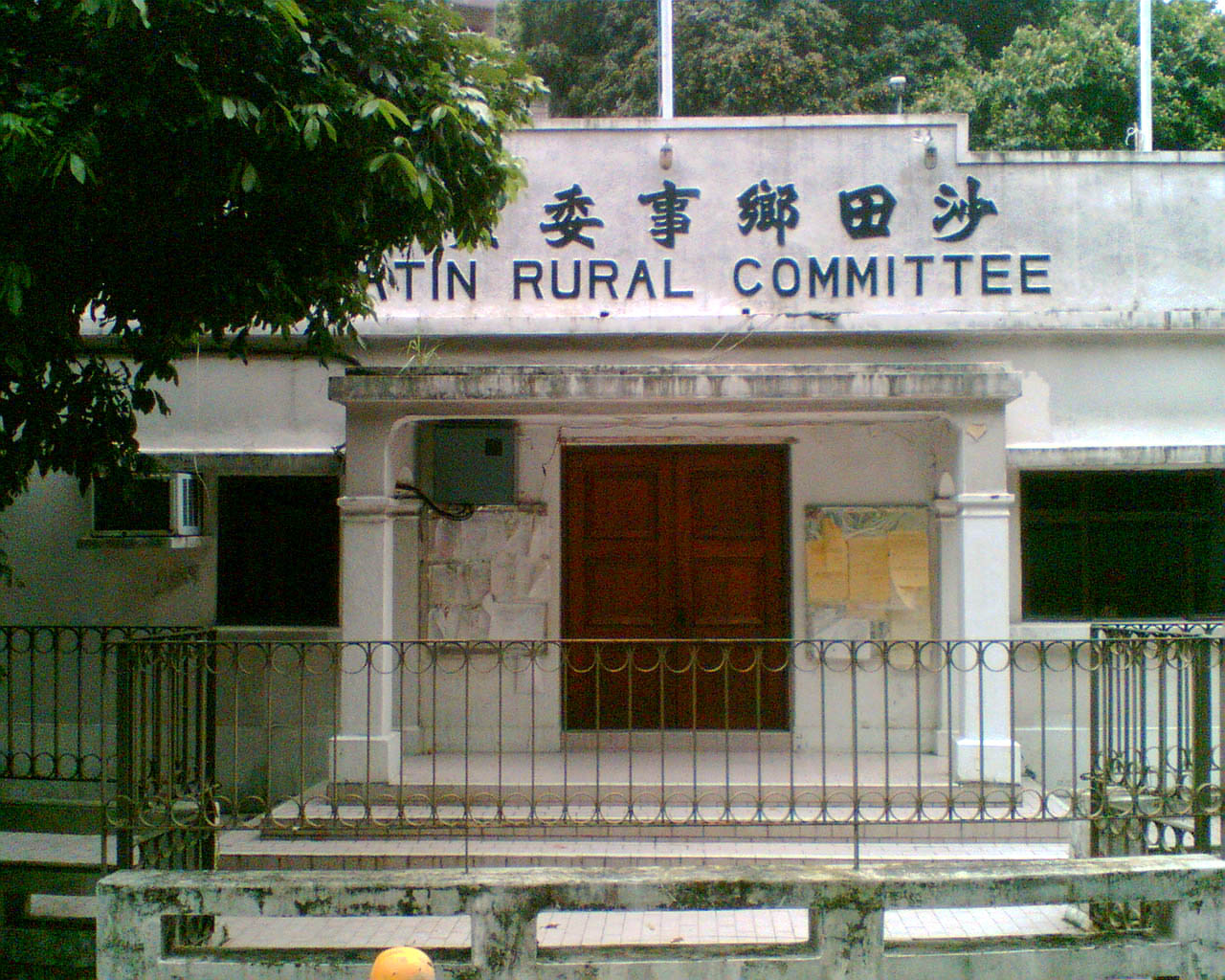 中文（香港）: 沙田鄉事委員會。